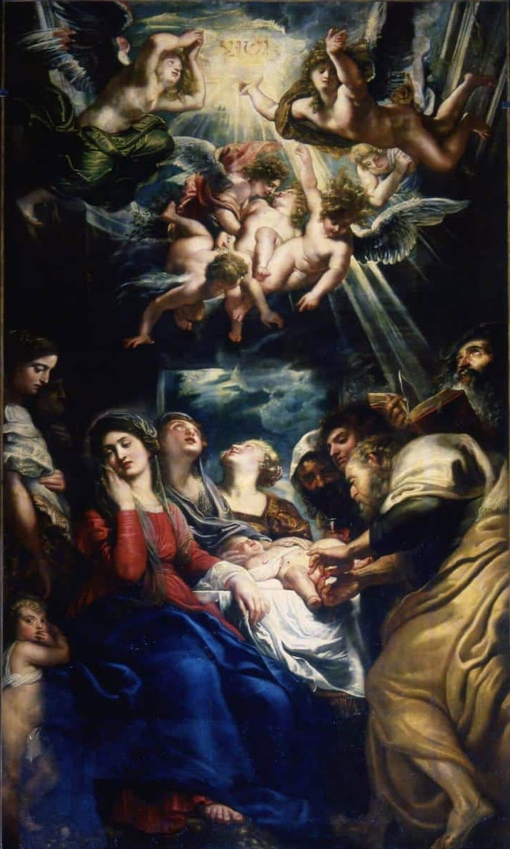 La Circoncisione di Gesù di Pieter Paul Rubens è un quadro a olio dipinto nel 1605 dal pittore nel corso dei suo soggiorno italiano e incaricato da Marcello Pallavicino. Si trova nella chiesa del Gesù e dei Santi Ambrogio e Andrea di Genova.